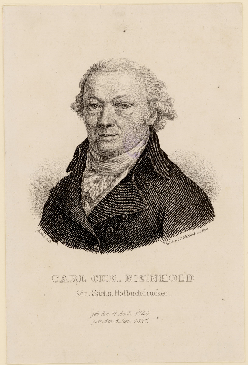 Wilhelm Heinrich Gottlieb Baisch, Porträt von Carl Christian Meinhold, Lithographie, um 1840.